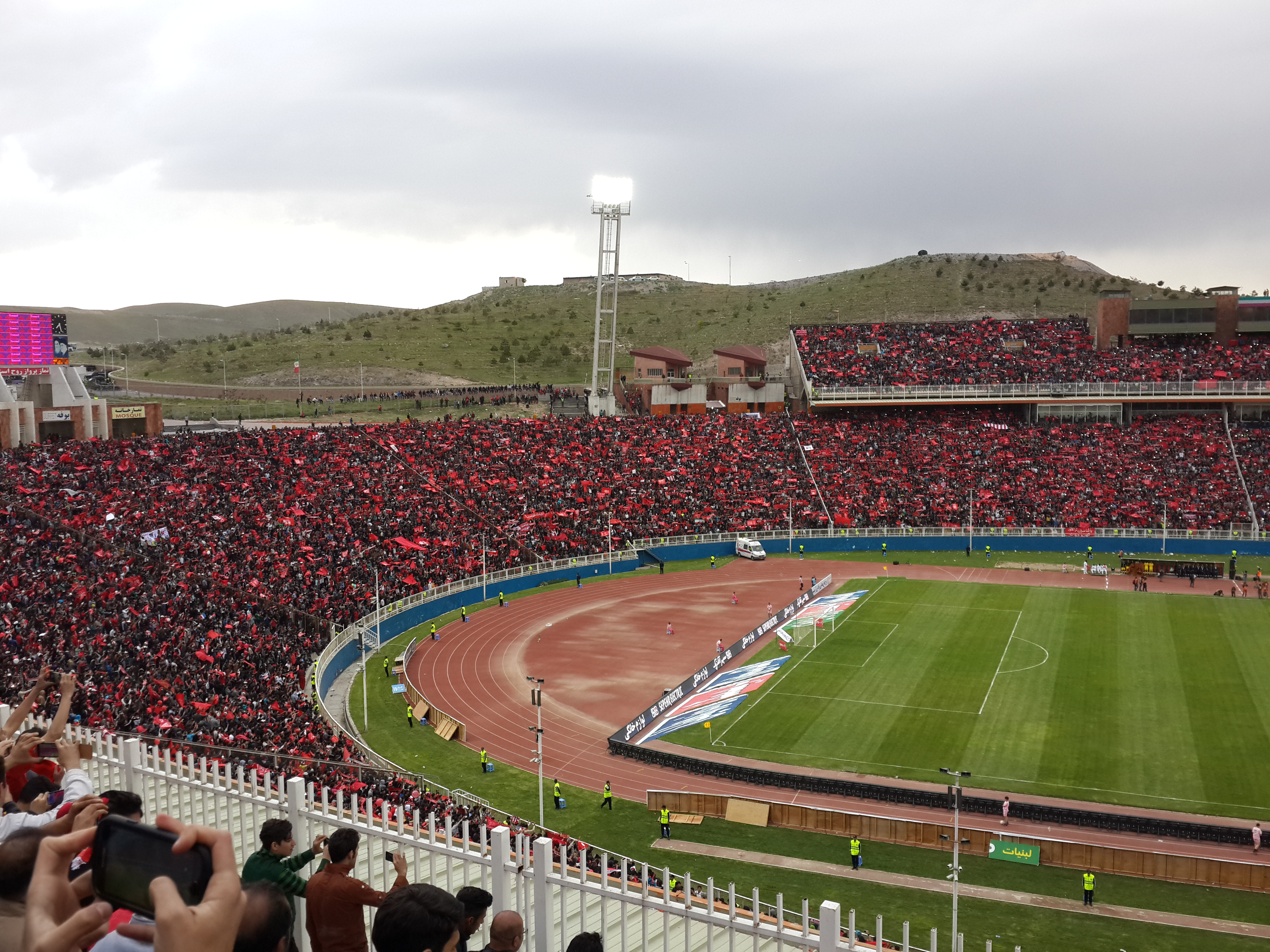 یادگار امام در بازی تراکتور نفت - اردیبهشت 94